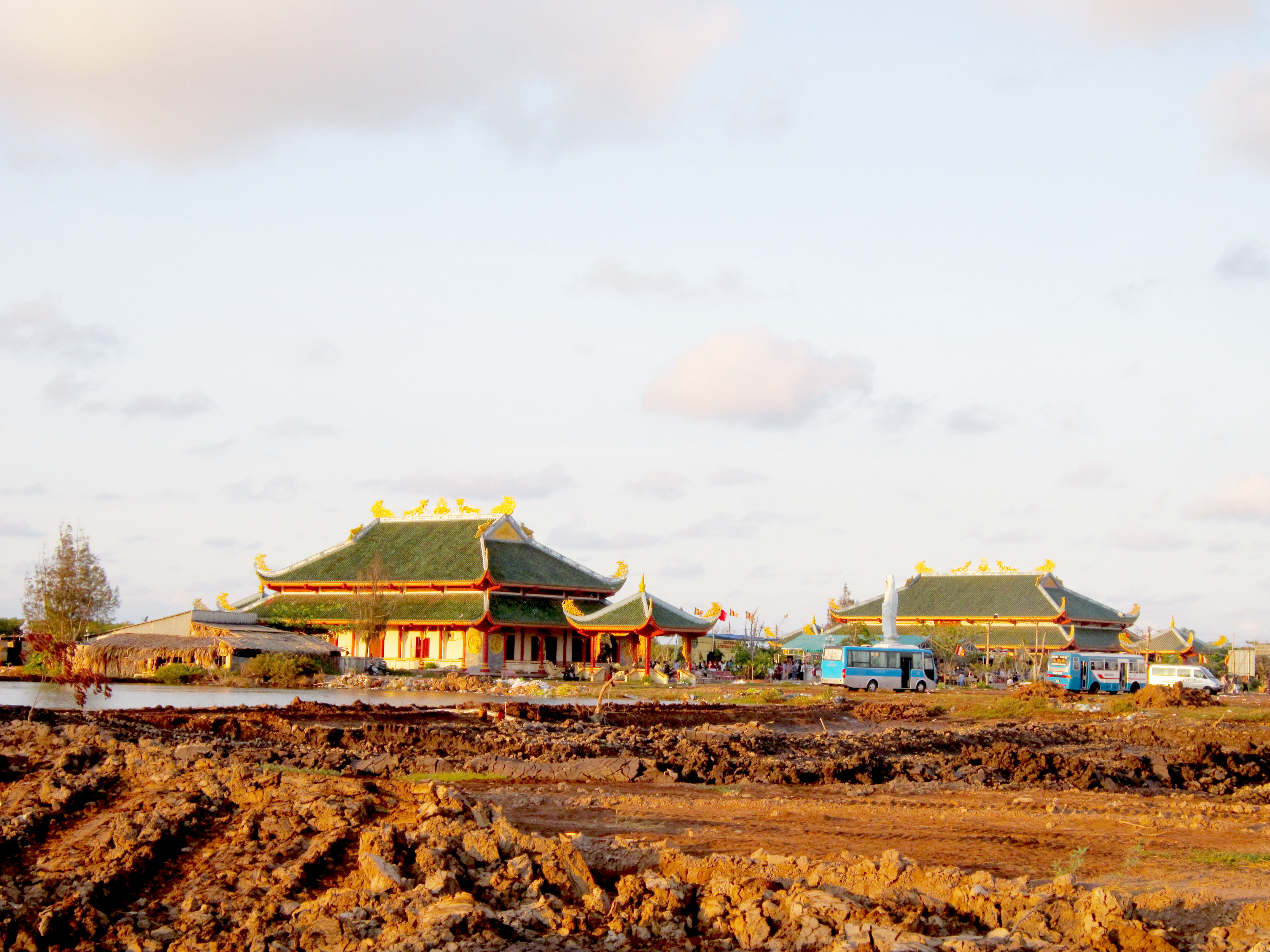 Chùa Quan Âm Phật Đài ở phường Nhà Mát, thành phố Bạc Liêu, tỉnh Bạc Liêu (Việt Nam).